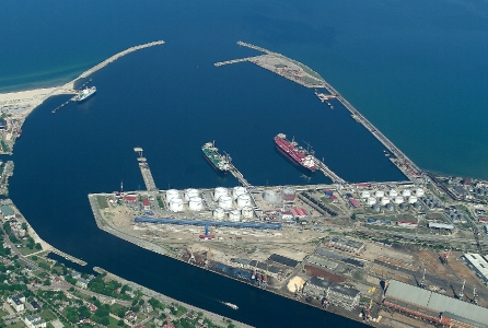 Ventspils brīvosta